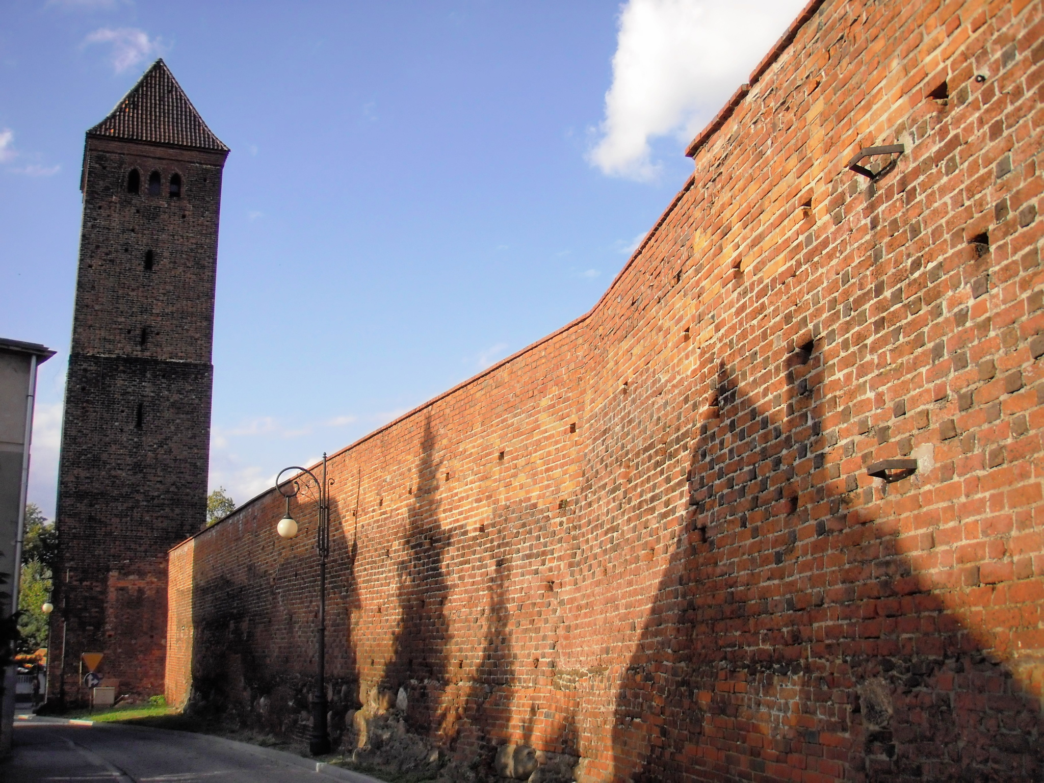 Byczyna, Brama Polska, XV-XVI